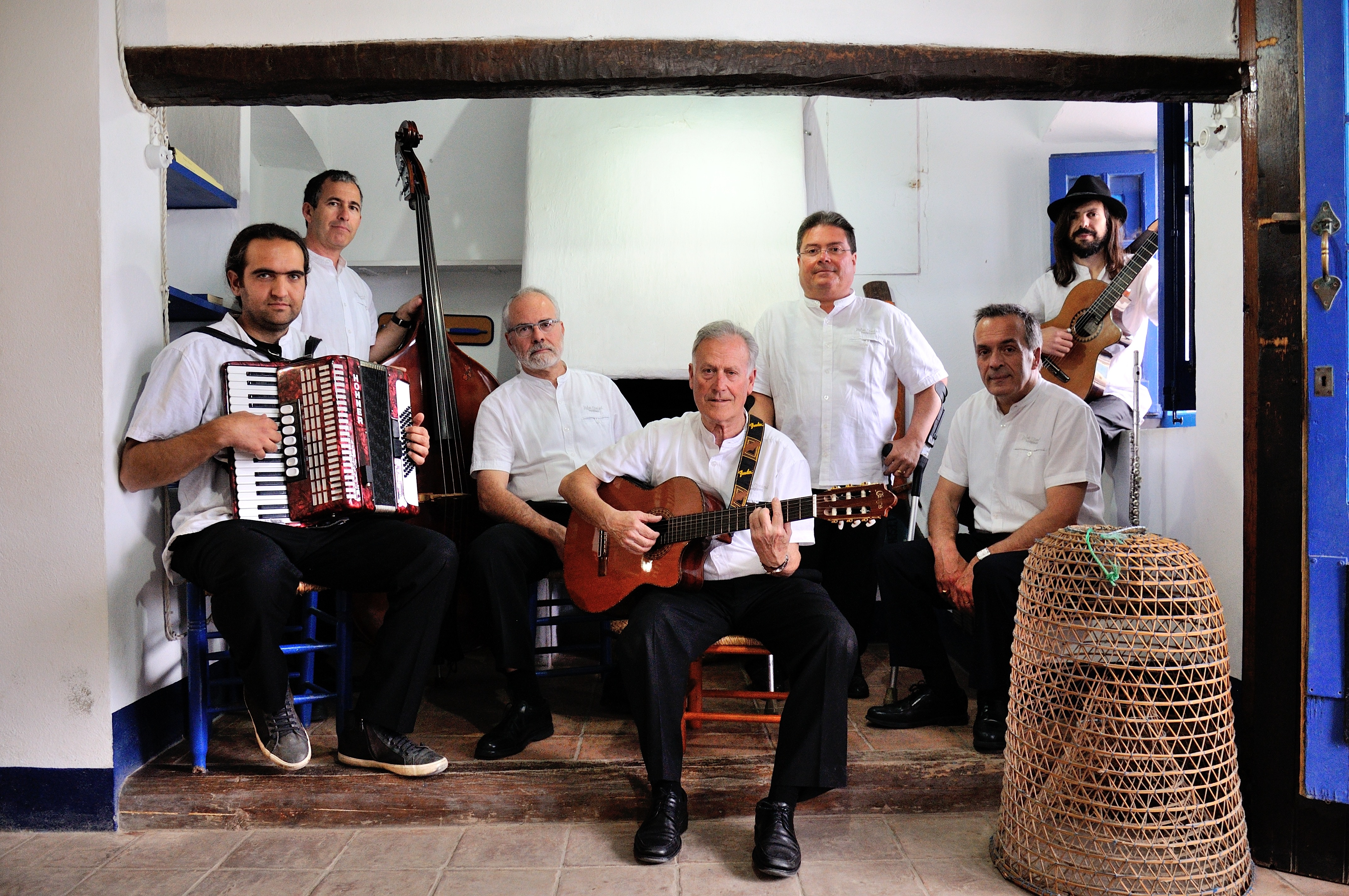 Fotografia del grup a la casa Barral.